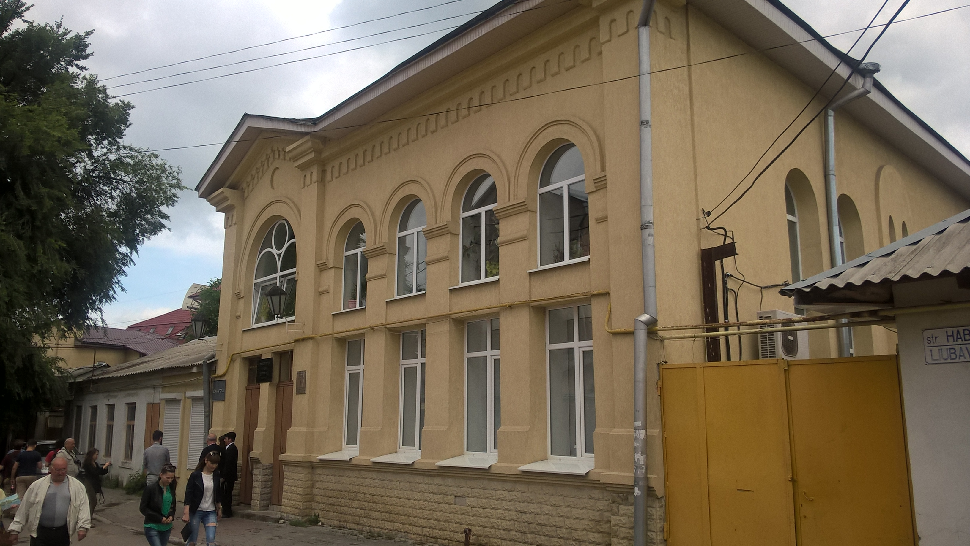 Synagoga przy ul. Columna, jedyna czynna bóżnica w Kiszyniowie